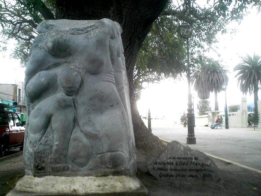 Monumento en memoria del sacerdote Antonio Llidó, detenido desaparecido durante la dictadura militar en Chile. Está ubicado en la Plaza de los Ceibos, en Quillota. La leyenda reza "A la memoria de Antonio Llidó Mengual y demás detenidos desaparecidos. Quillota 29 de Abril 2006".